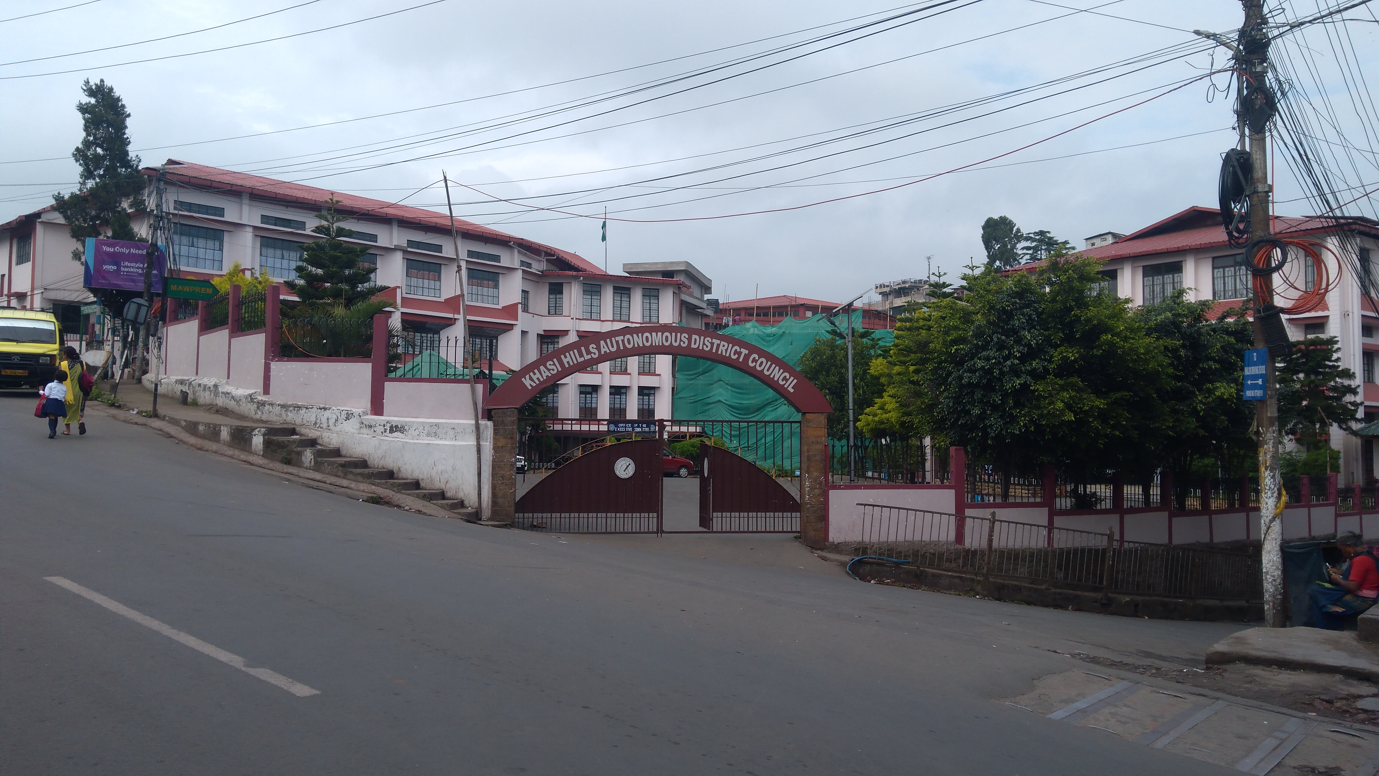 खासी स्वायत्त परिषद का भवन, शिलांग, मेघालय।